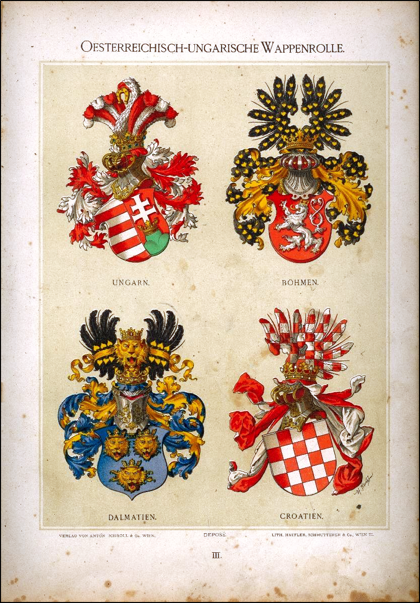 Tafel III. Ungarn, Böhmen, Dalmatien, Kroatien.